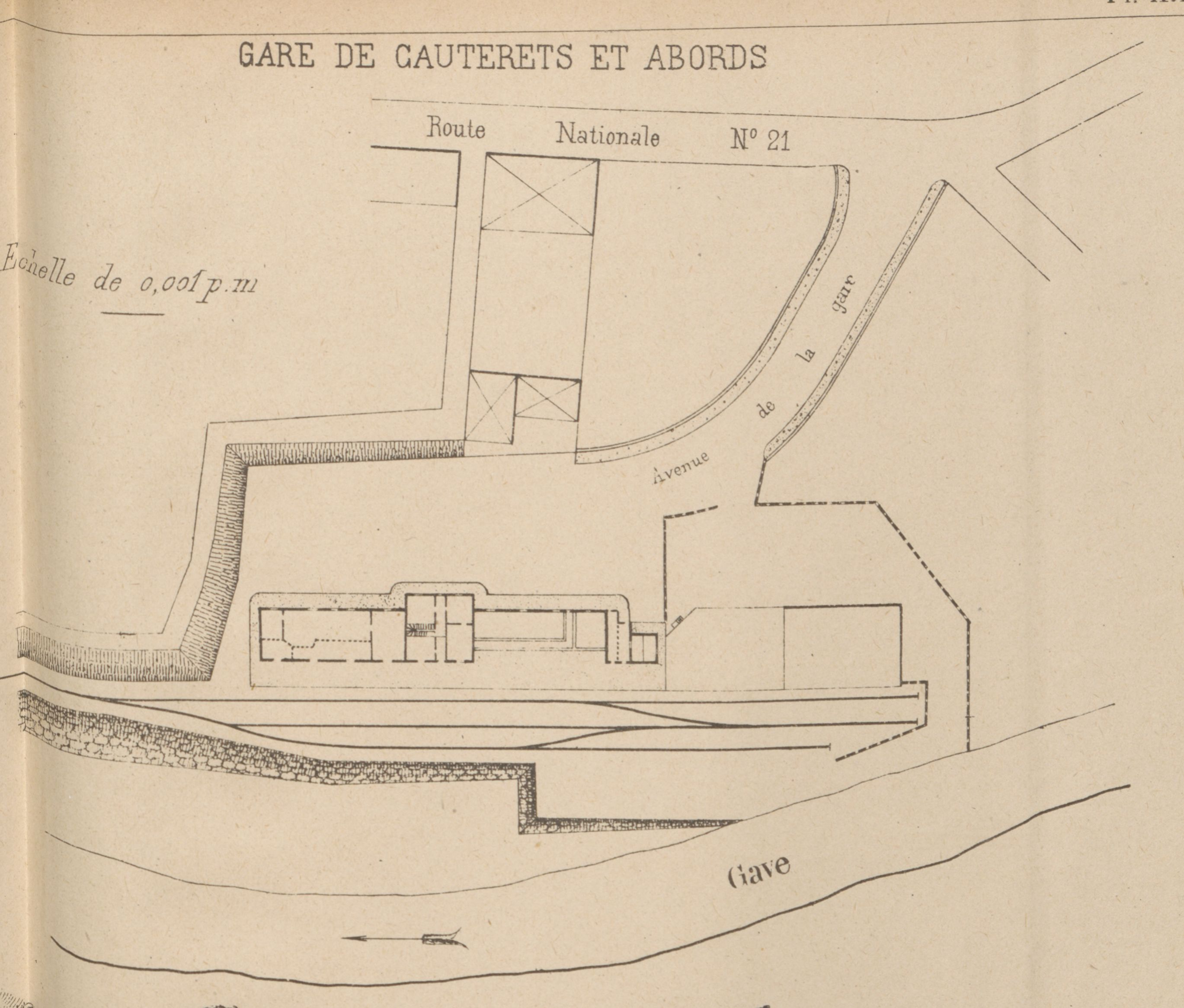 Plan de la gare de Cauterets en 1901